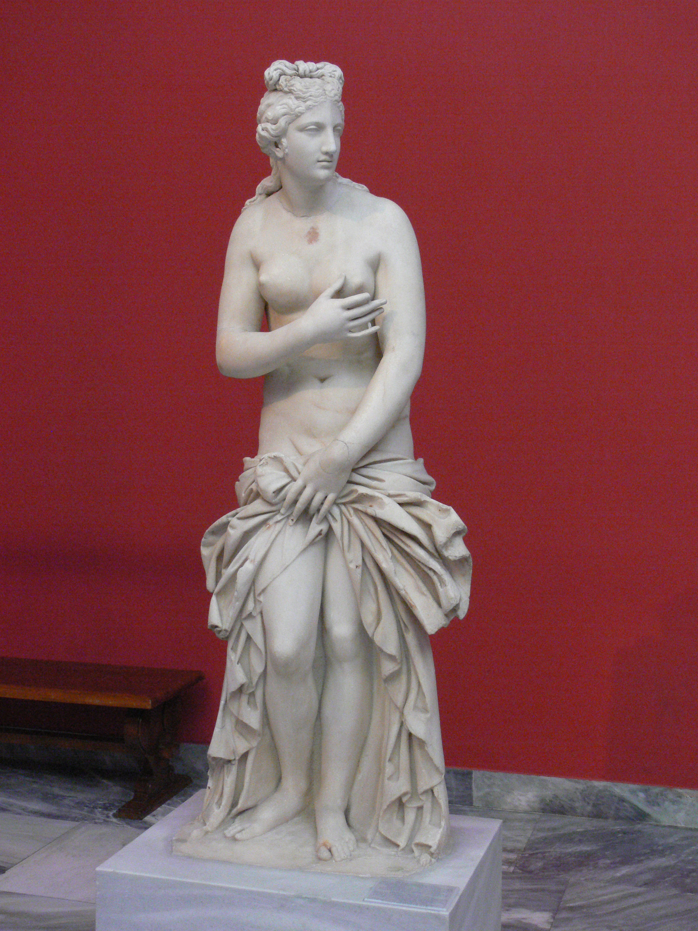 Aphrodite im Museum von Athen